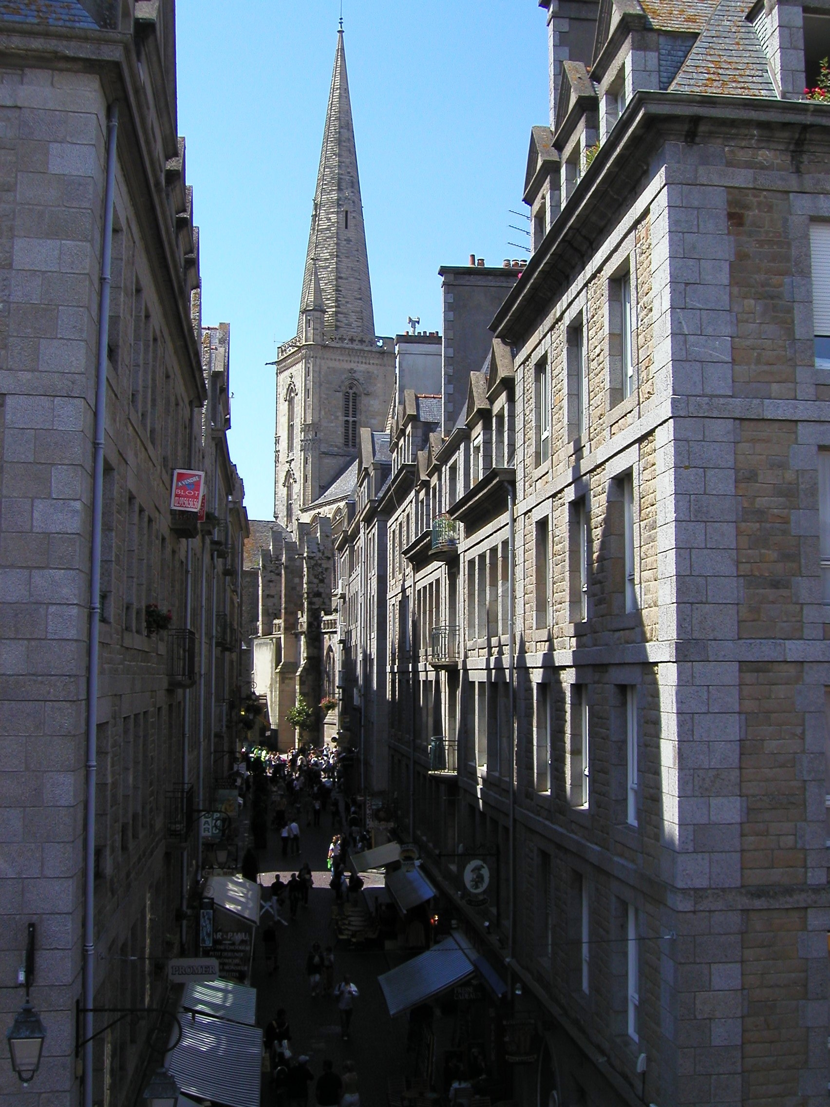 Blick in die Stadt Saint-Malo